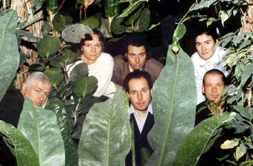 German Band "Kammerflimmer Kollektief"